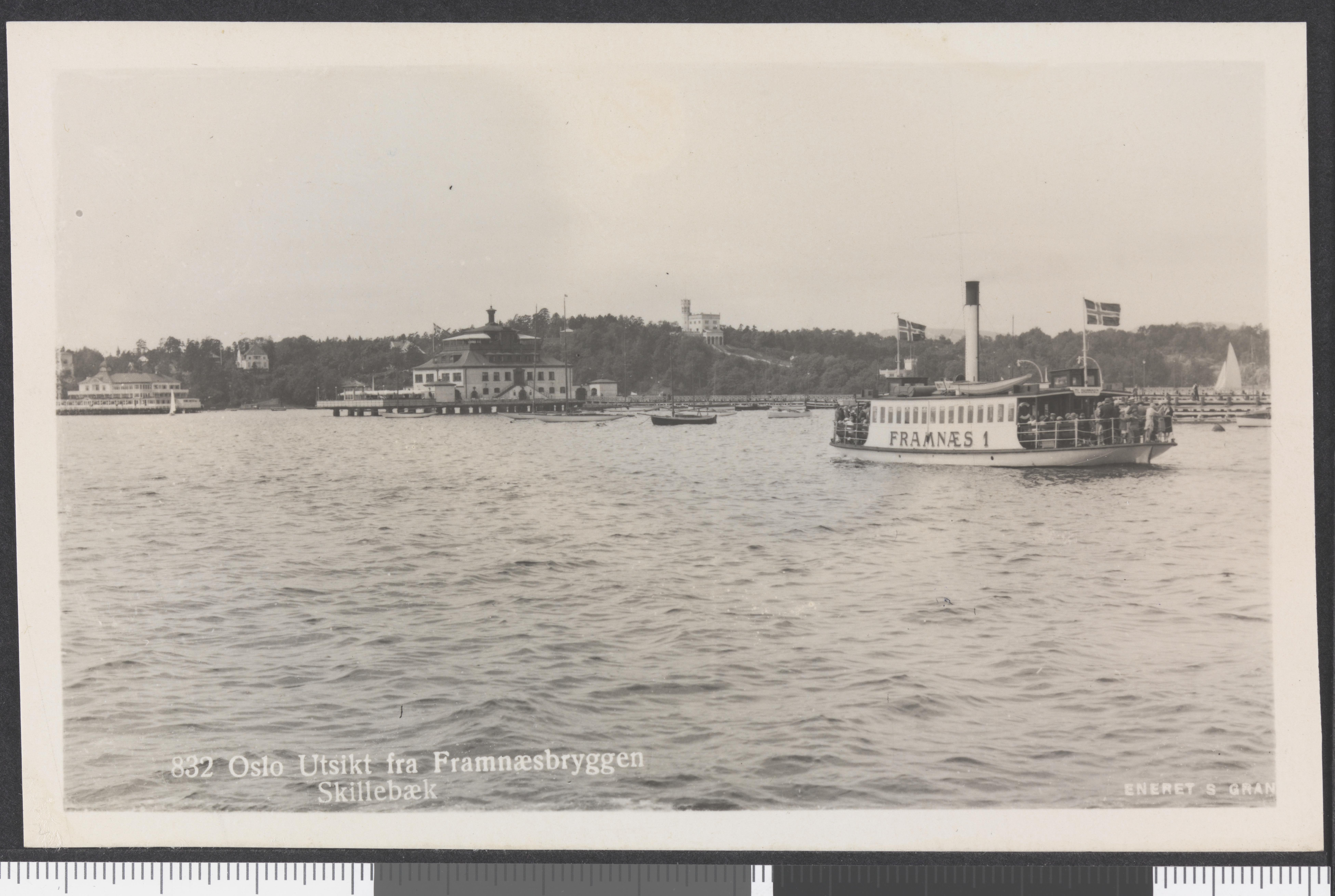 Bildet er hentet fra Nasjonalbibliotekets bildesamling Bygdøy,Skillebekk, Oslo, Oslo